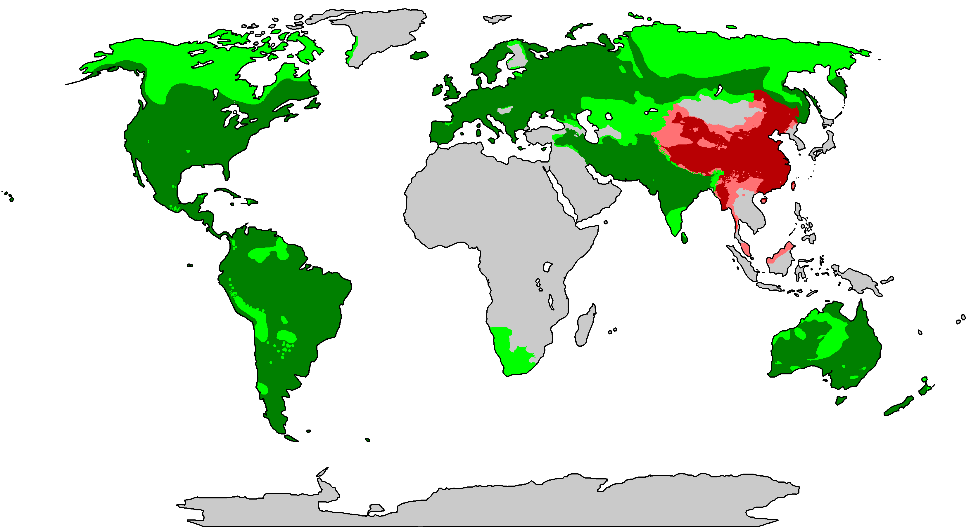 印欧语系语言和汉藏语系语言母语者在世界上的分布。图中红色为汉藏语分布区，绿色为印欧语分布区，其中浅色是指该地区同时存在其它语言